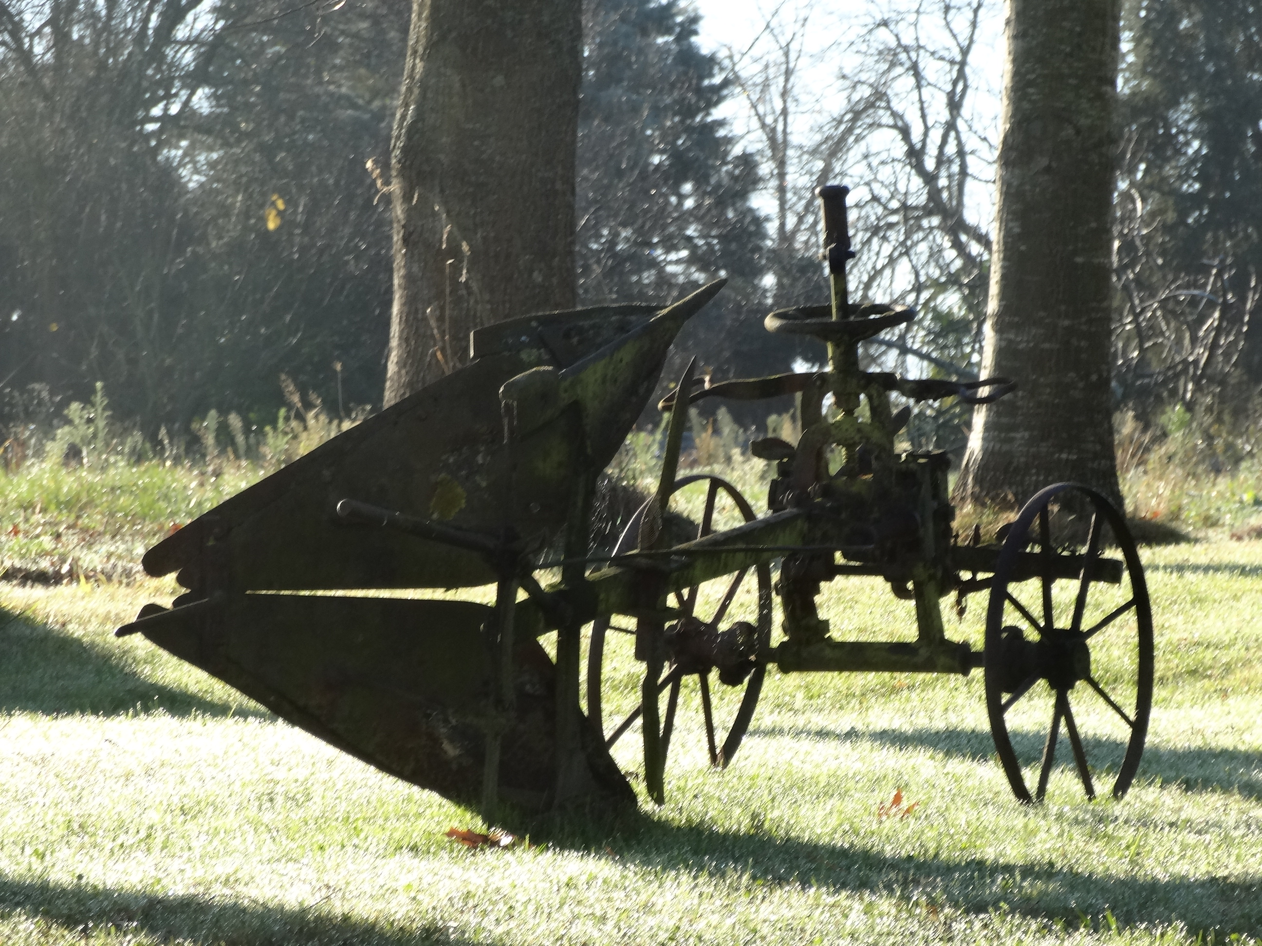 Charrue d'antan